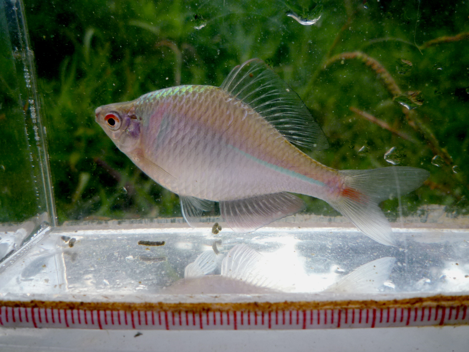 Color Adjustment を施しアップロード